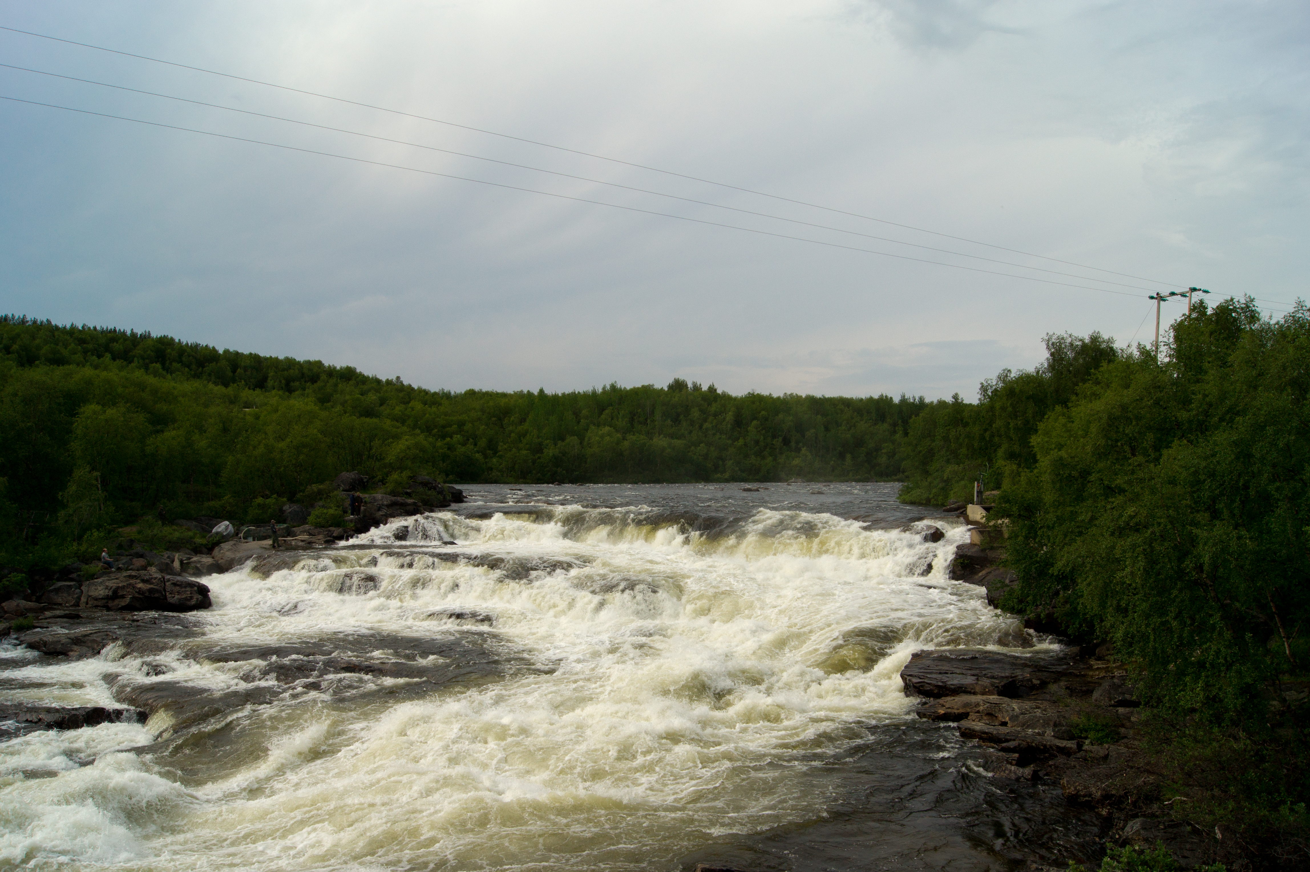 Chutes d'eau sur la Neidenelva.